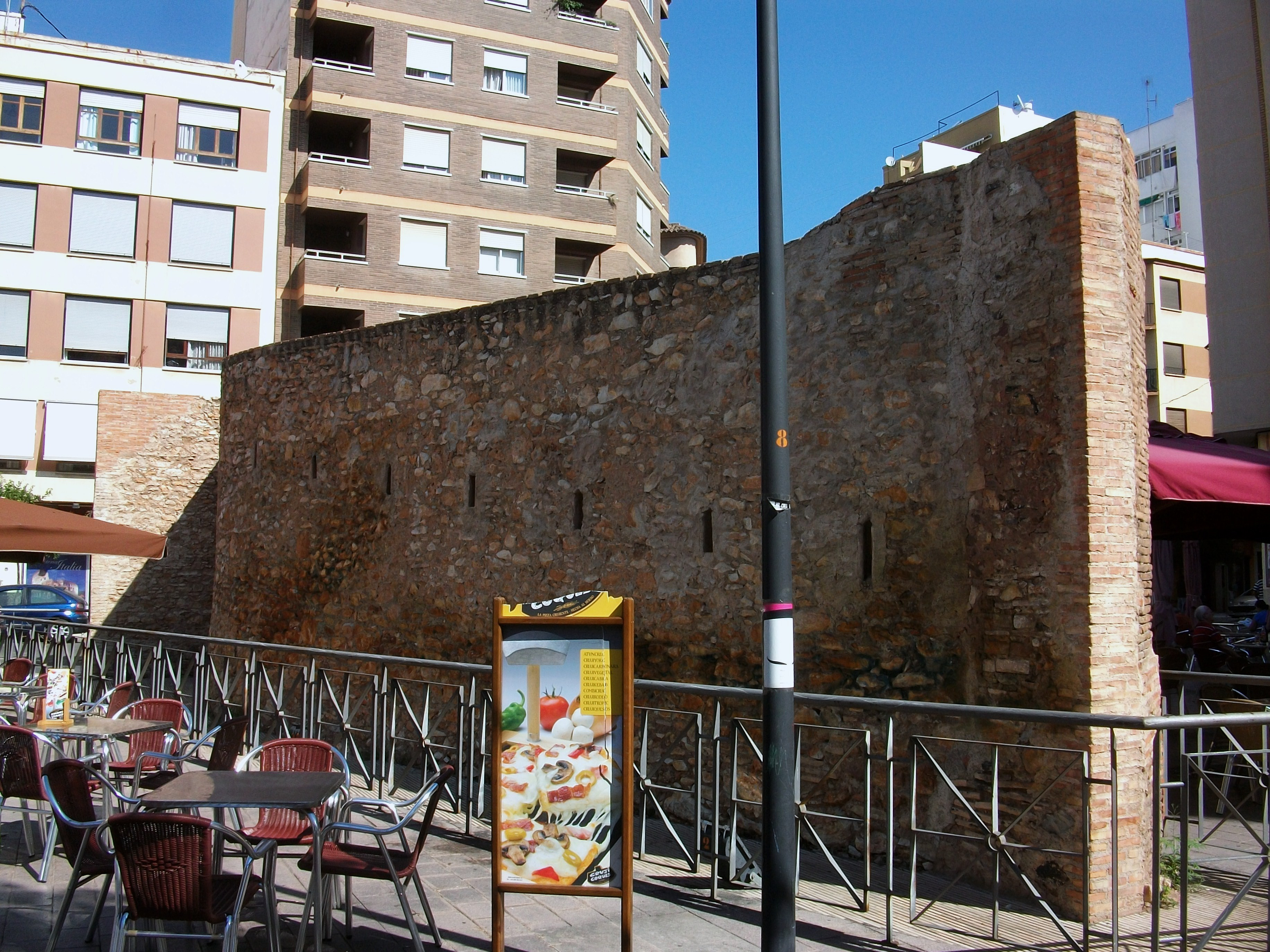 Muralla liberal de Castelló de la Plana.